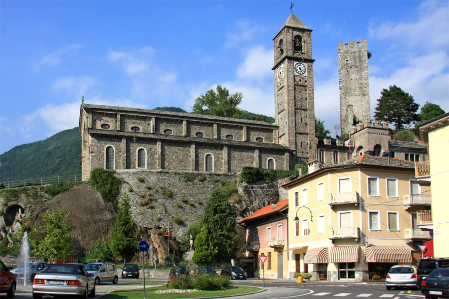 Scorcio della piazza di Pont Canavese (TO) sovrastata dalla chiesa parrocchiale di San Costanzo